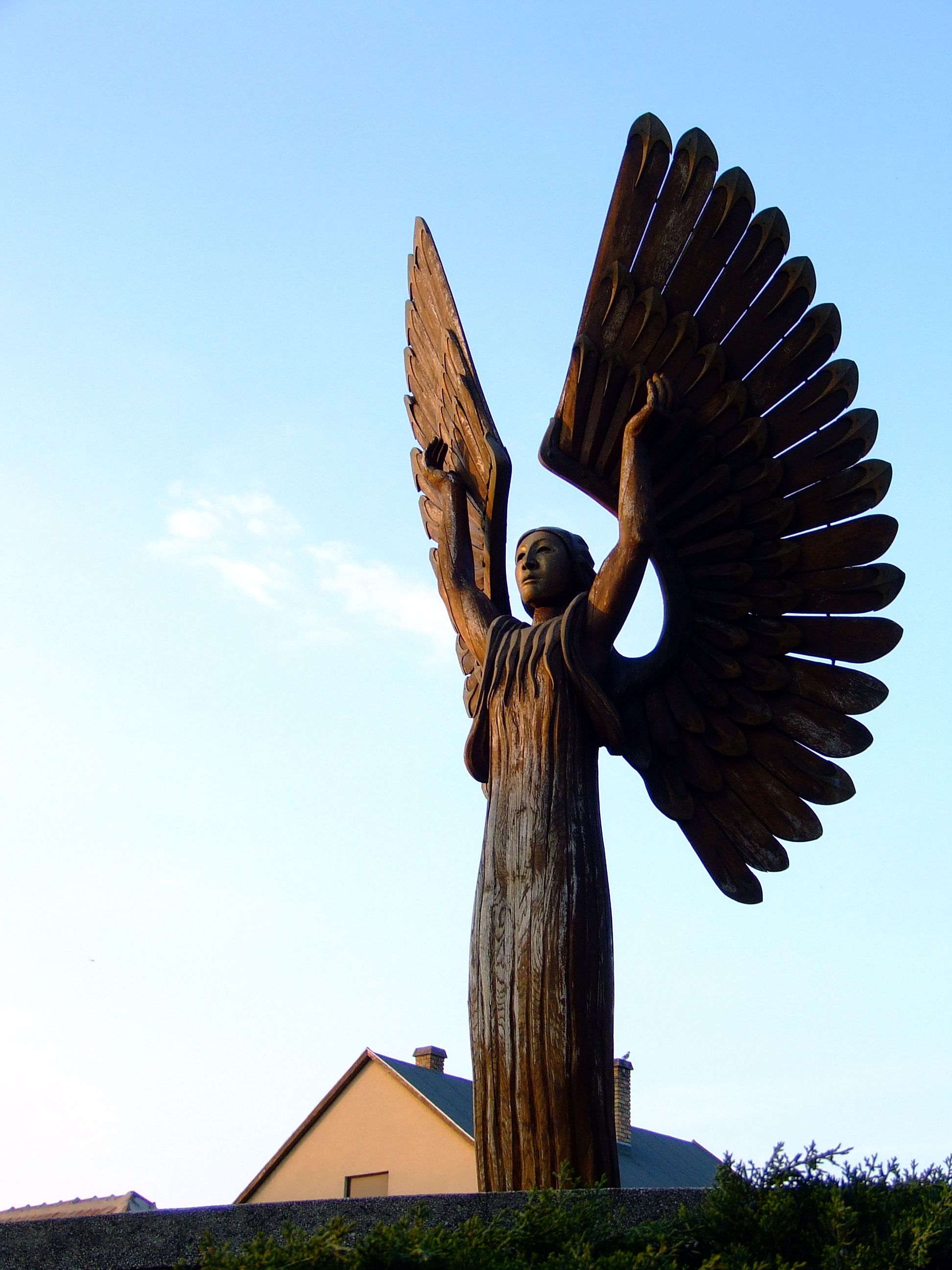 Angyalszobor a paksi Szentlélek-templom bejáratánál, a Hősök terén. Péterfy László (*1936) szobrászművész alkotása (1991)